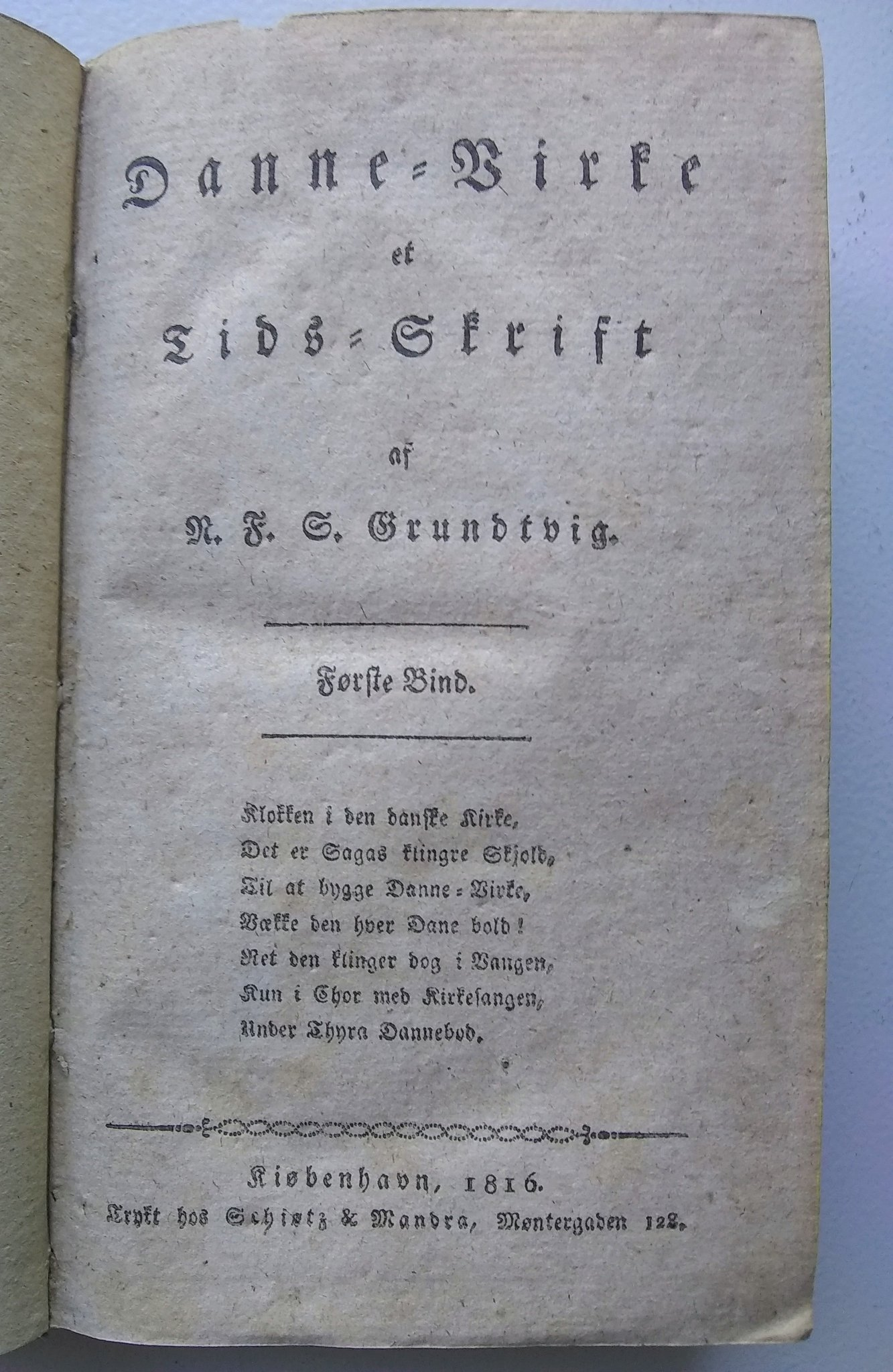 Titelbladet til første bind af Danne-Virke med den gennemgående mottostrofe.